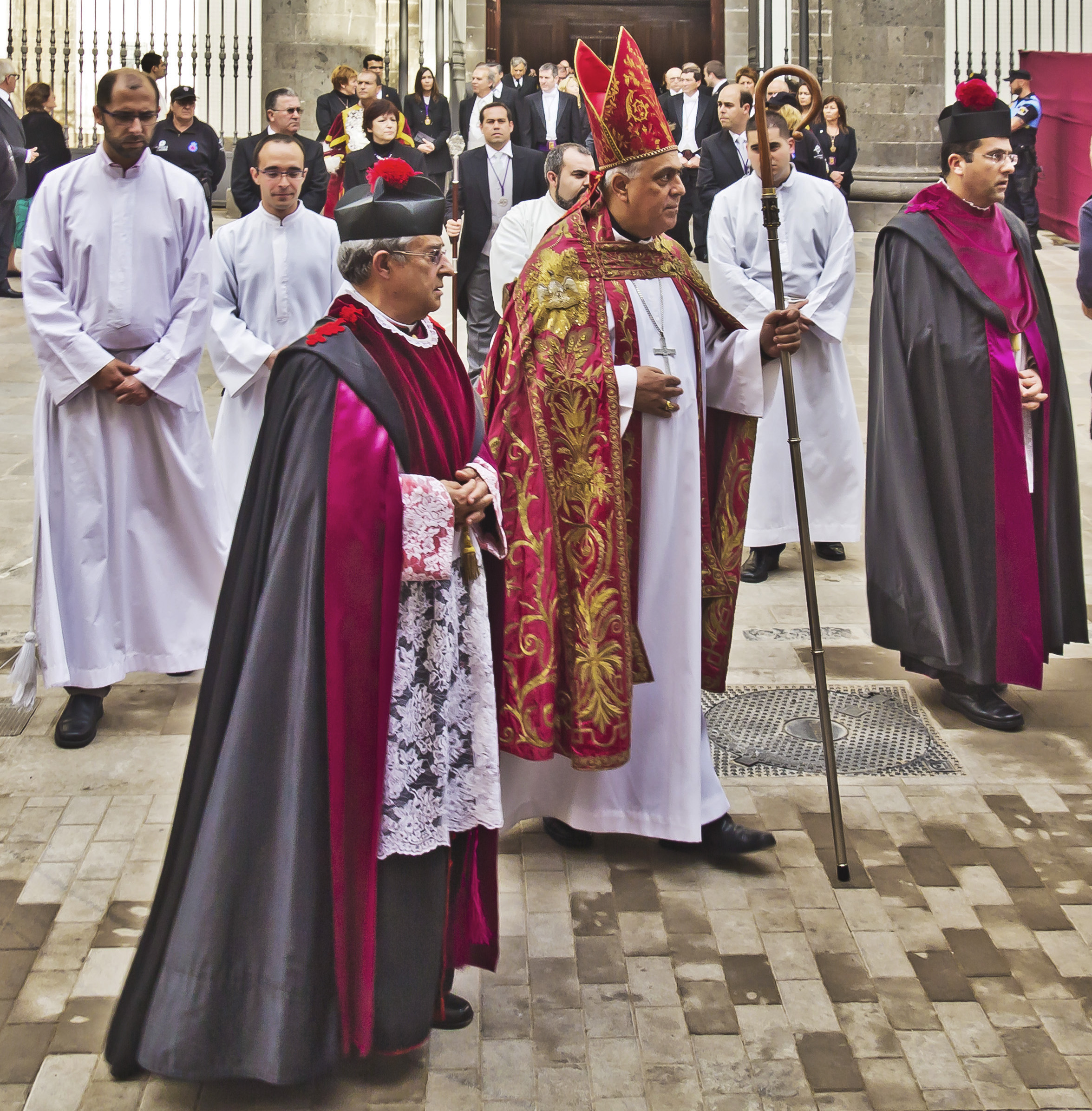 El Excelentísimo y Reverendísimo Señor Obispo de la Diócesis Don Bernardo Álvarez Afonso y el Excelentísimo Cabildo Catedral